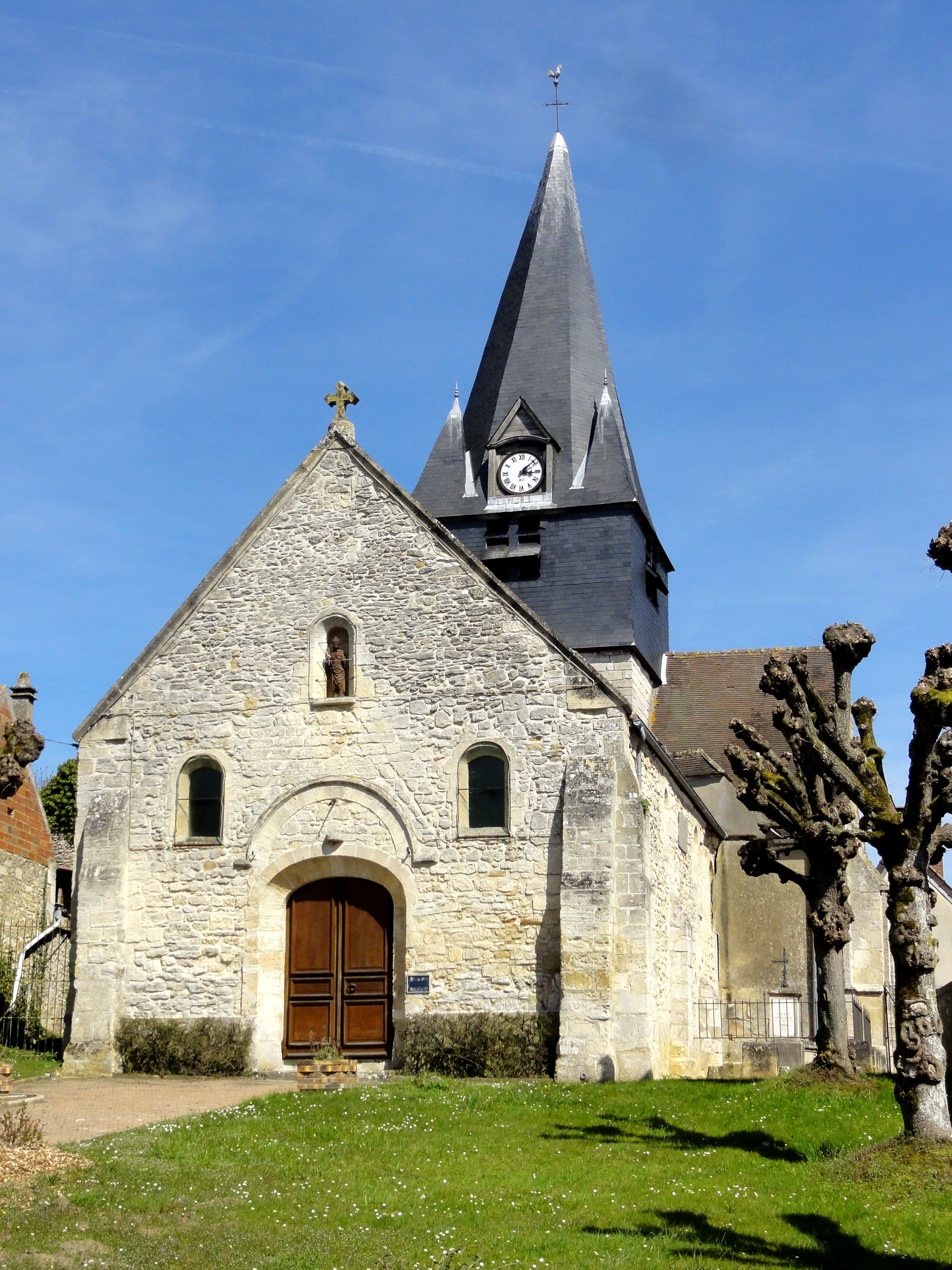 Façade occidentale.